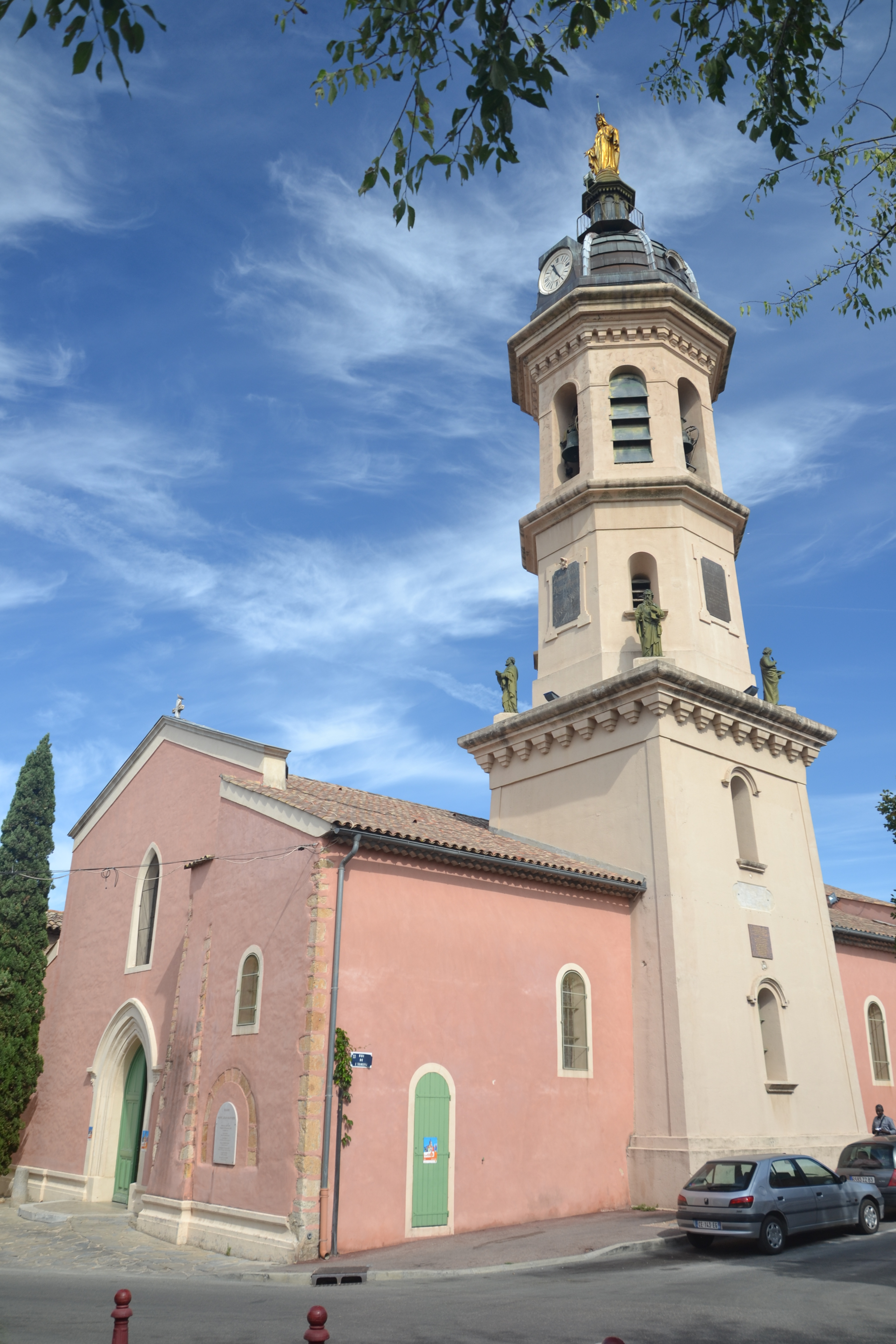 église Saint-Jean-Baptiste